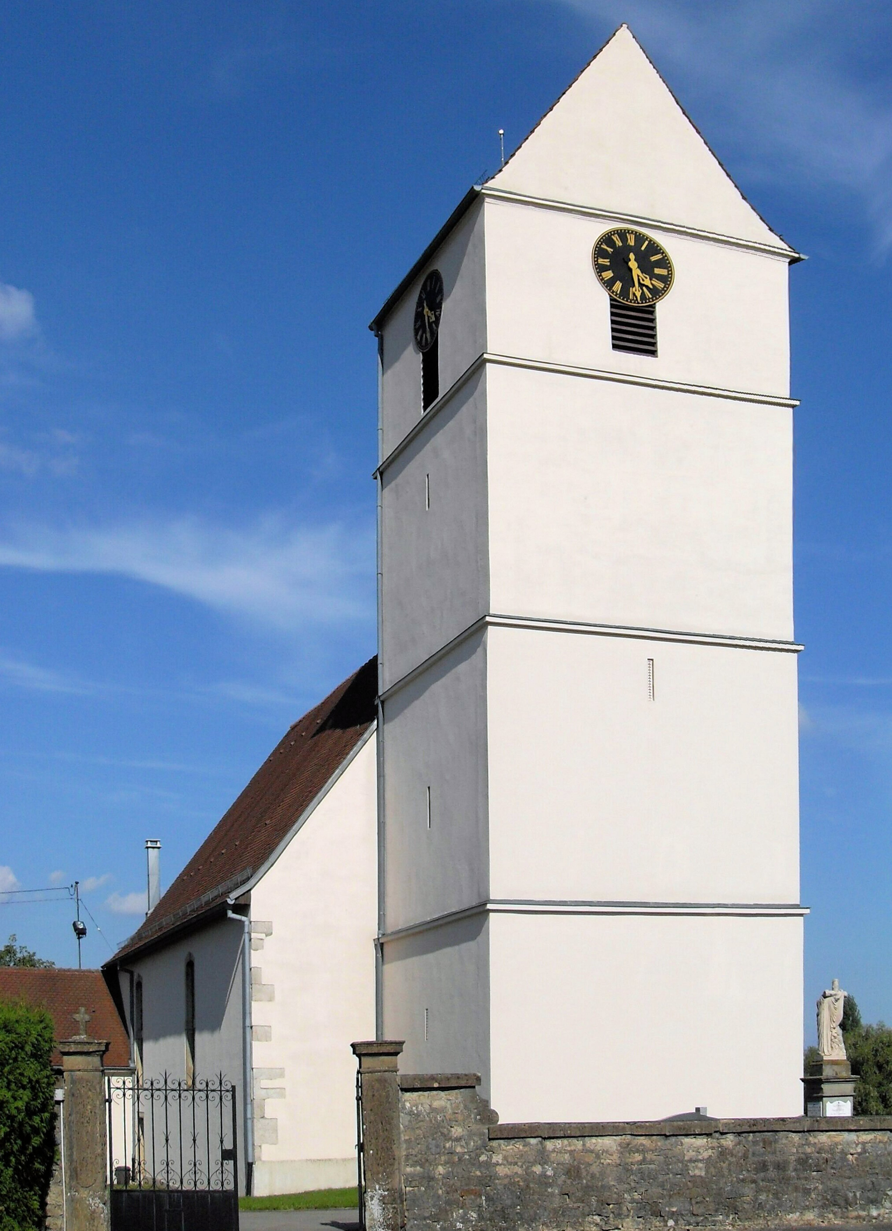 L'église Saint-Léger à Kœstlach